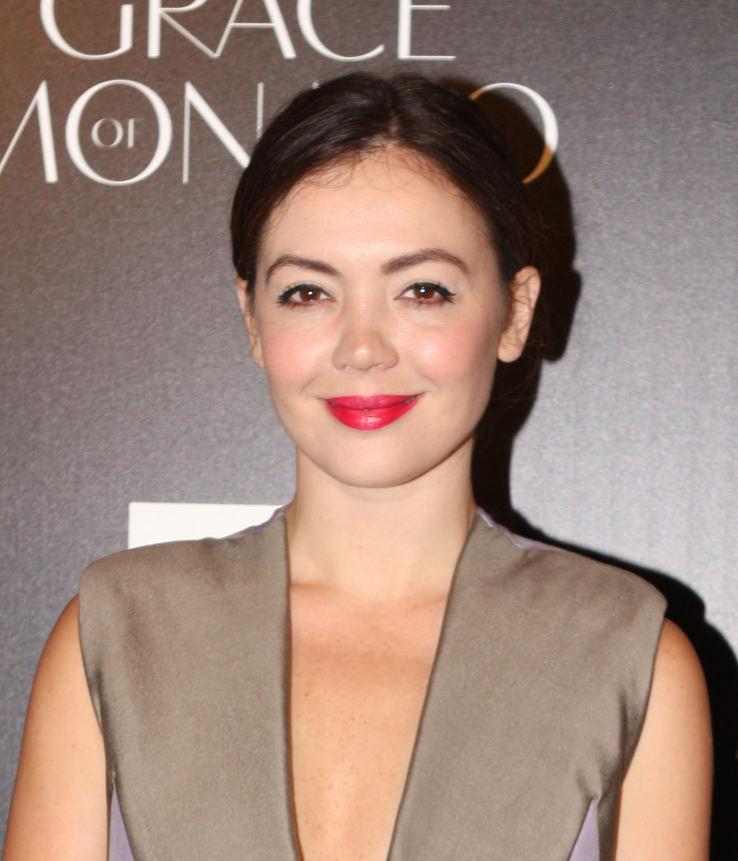 Emma Lung à la première de Grace of Monaco